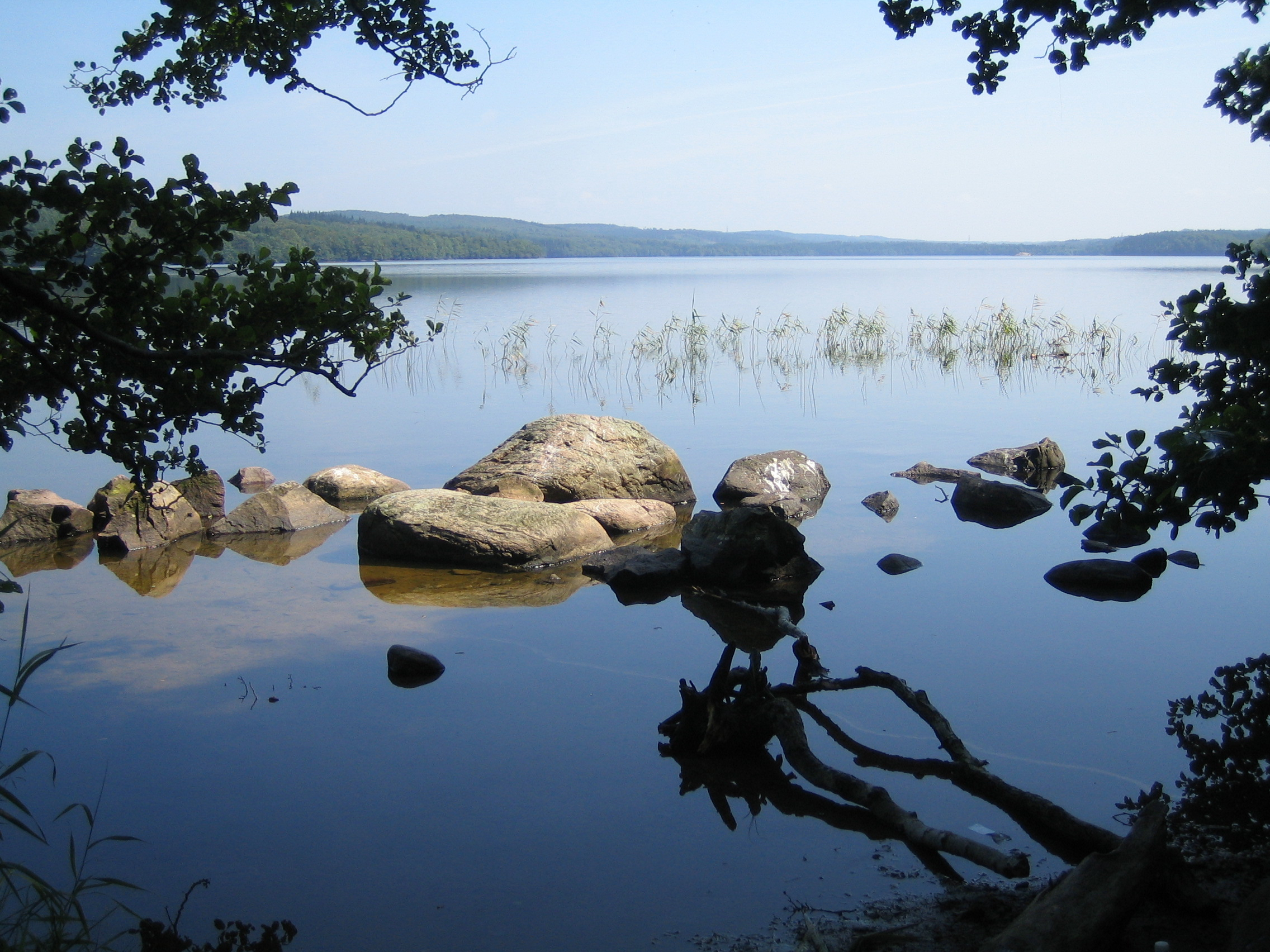 Rössjön, lake in Skåne, Sweden